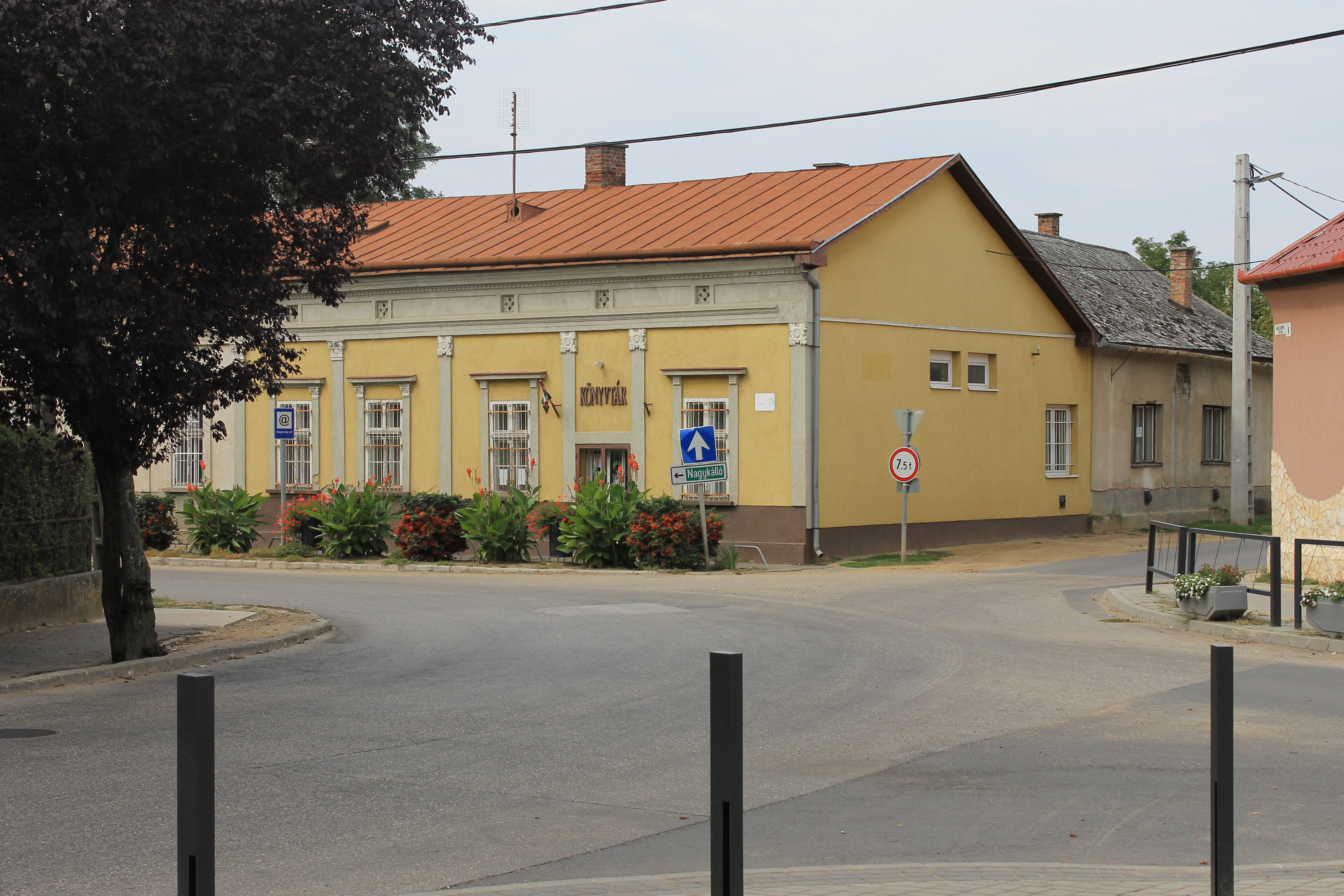 A Városi Könyvtár és Teleház Balkányban. Műemlék azonosító: 15684. - Szabolcs-Szatmár-Bereg, Balkány, Kossuth u. 1.